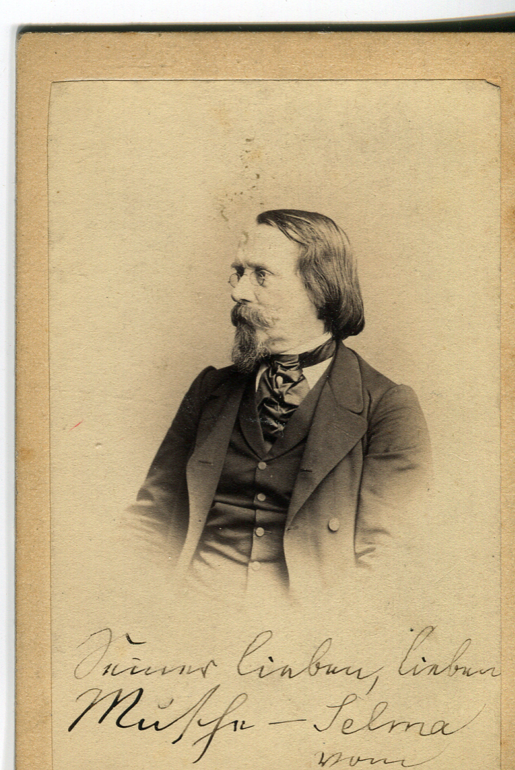 Friedrich Hironymus Truhn